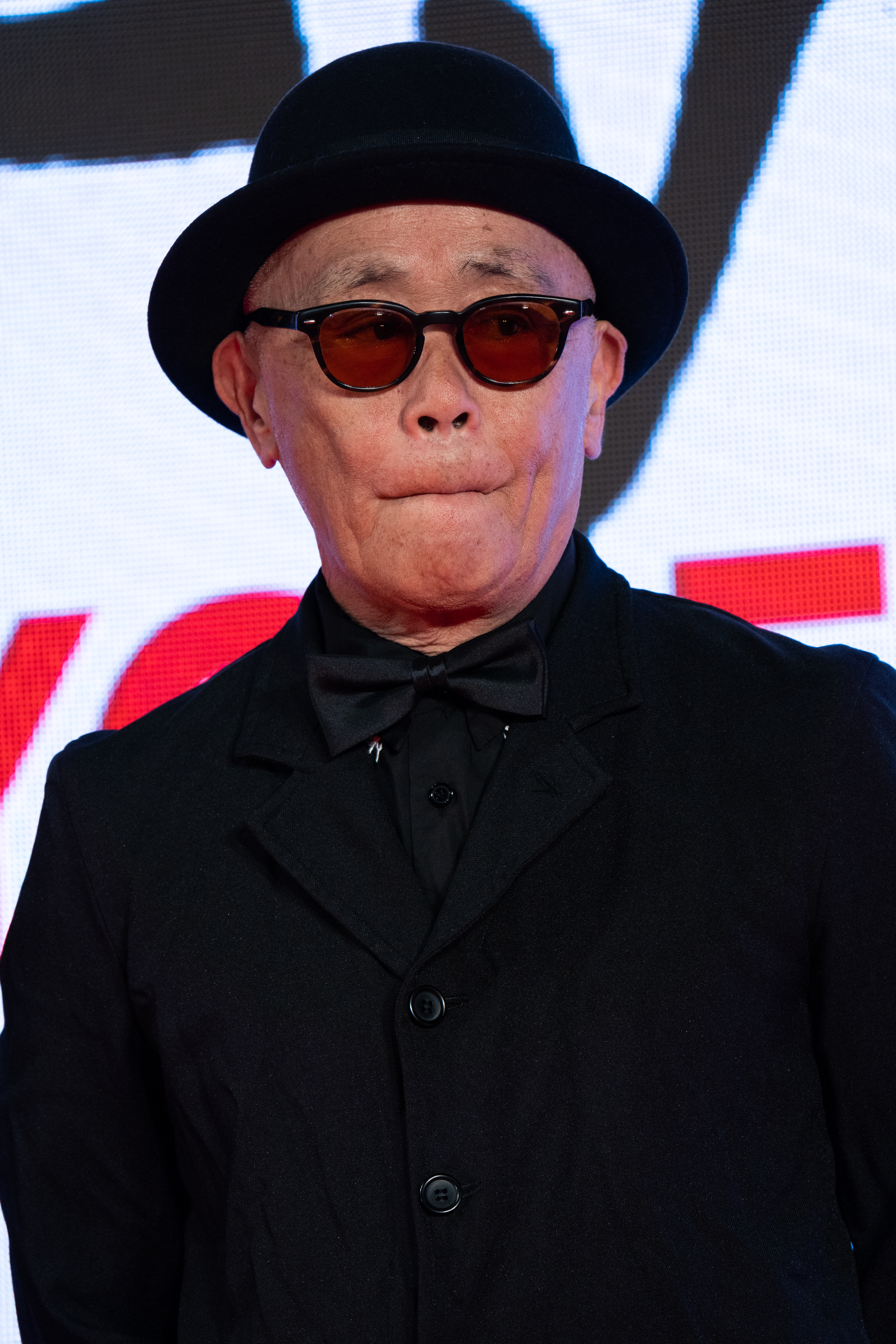 第32回 東京国際映画祭 オープニングセレモニー 廣木隆一 (審査委員)